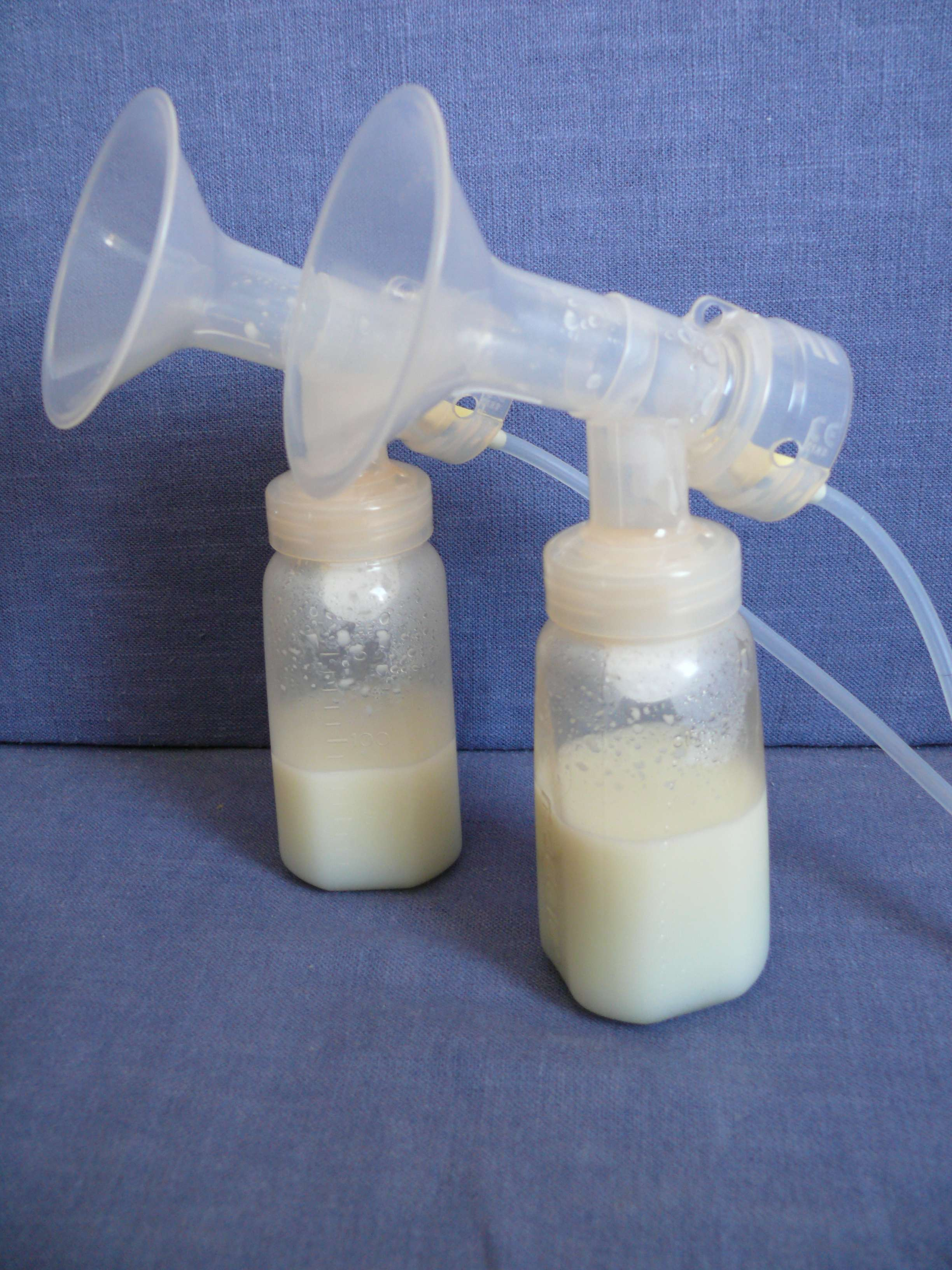 Frisch abgepumpte Muttermilch, die mit Hilfe einer elektrischen, beidseitigen Milchpumpe gewonnen wurde.